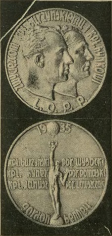 Medal zaprojektowany przez Olgę Niewską. W styczniu 1936 został wręczony XXIII Pucharu Gordona Bennetta.